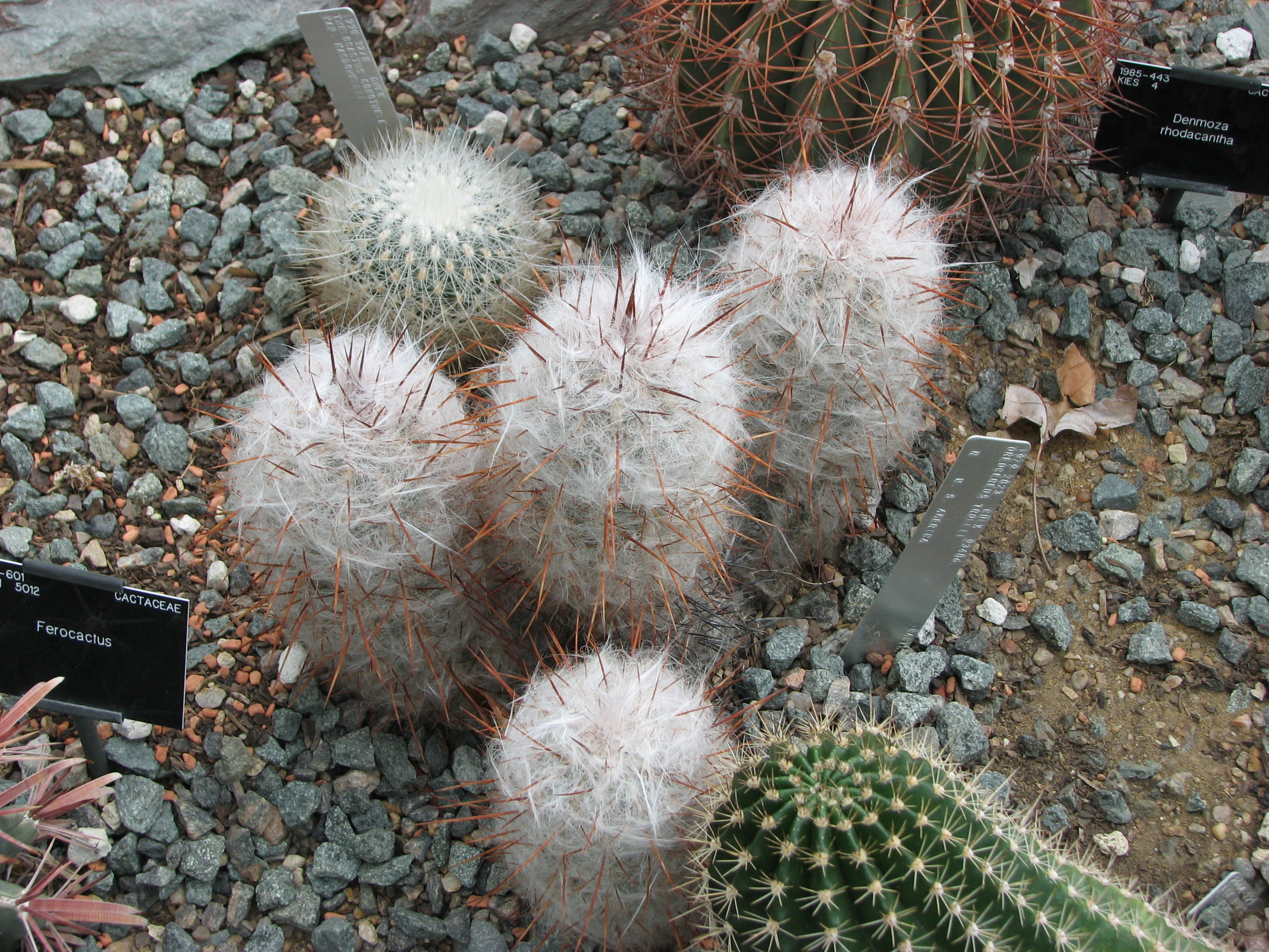 Kew Gardens - London - September 2008